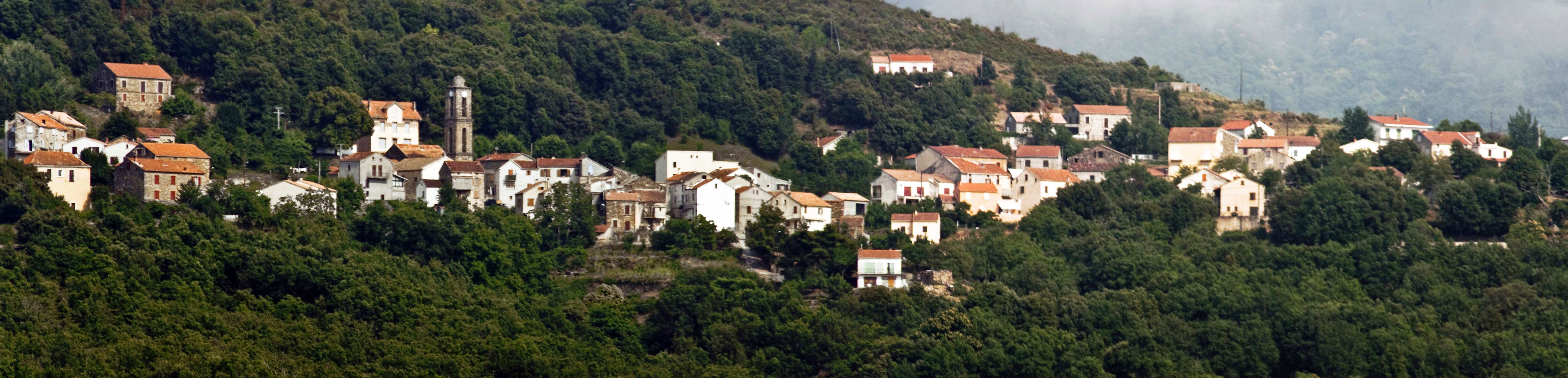 Panorama du village d'Erbajolo (Gaggio)